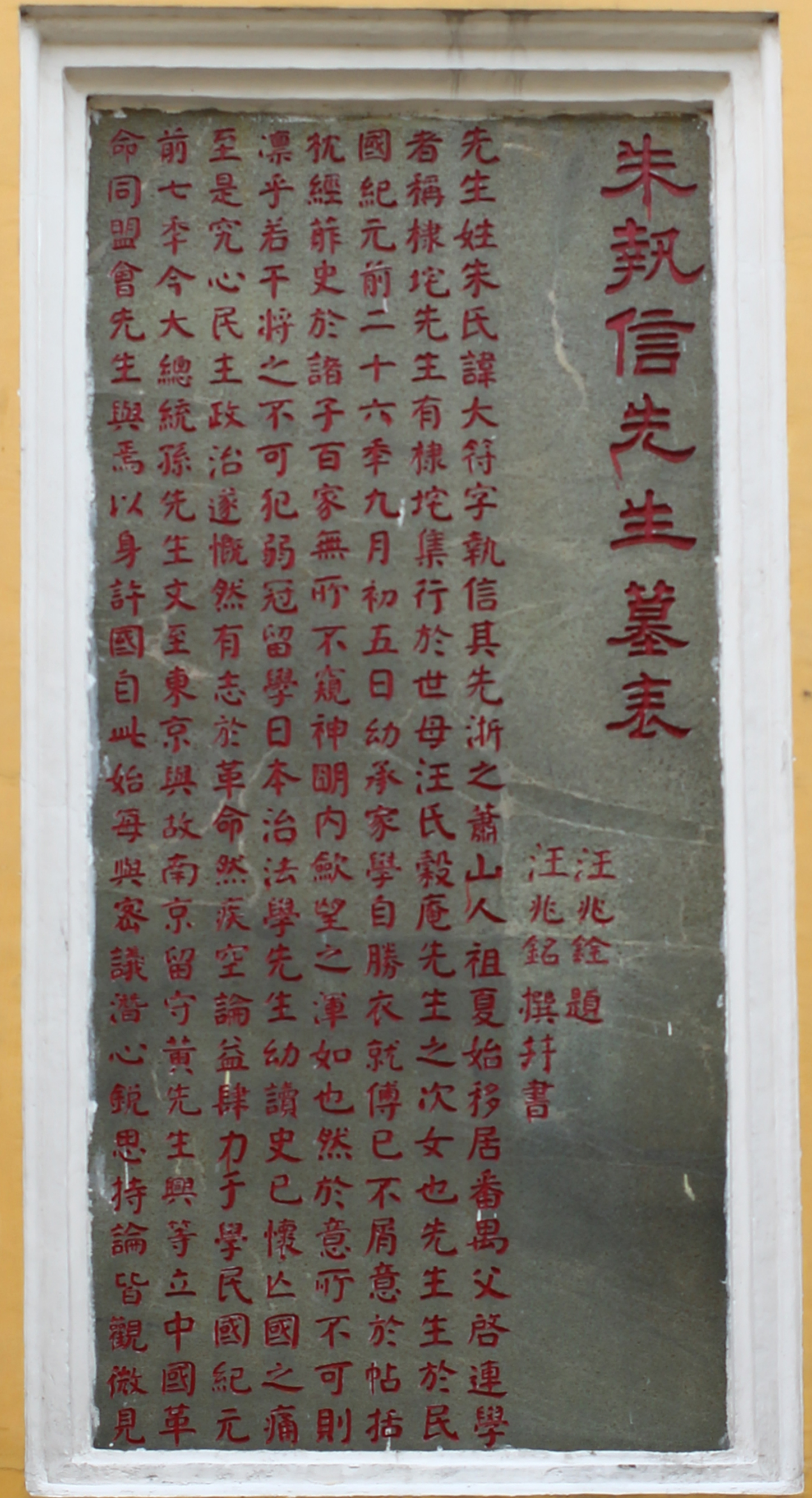 朱執信先生墓表。汪兆銓題，汪兆銘撰並書。中華民國十一年四月一日。碑文在文化大革命期間曾被破壞。